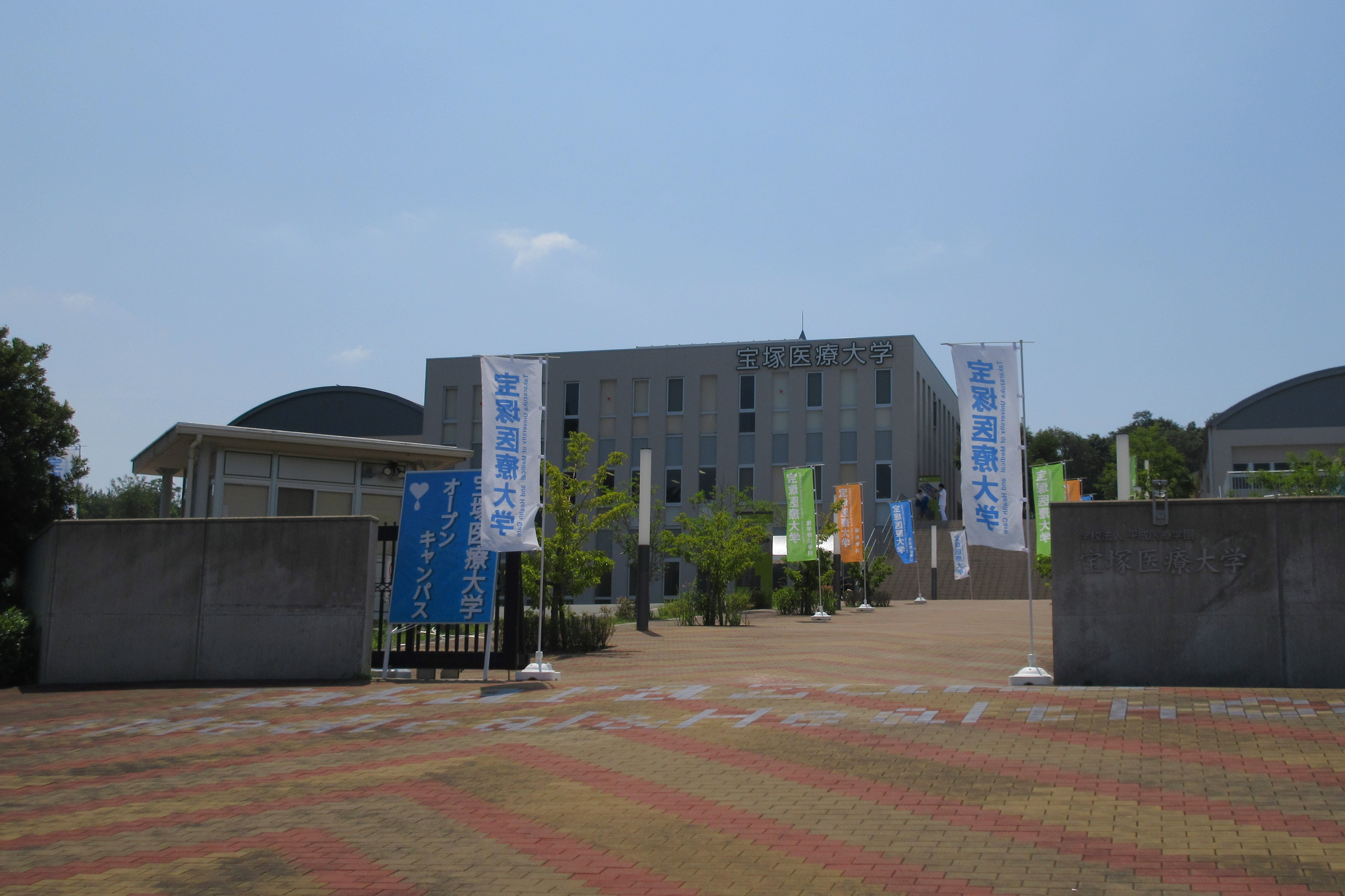 宝塚医療大学